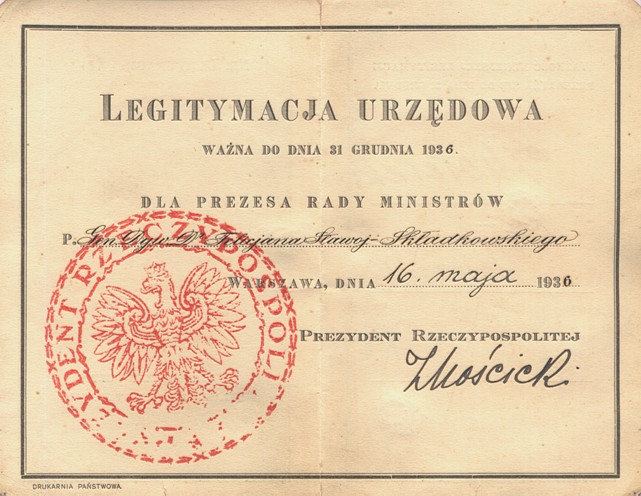 The ID Card of Polish Prime Minister Felicjan Sławoj Składkowski (1885-1962)